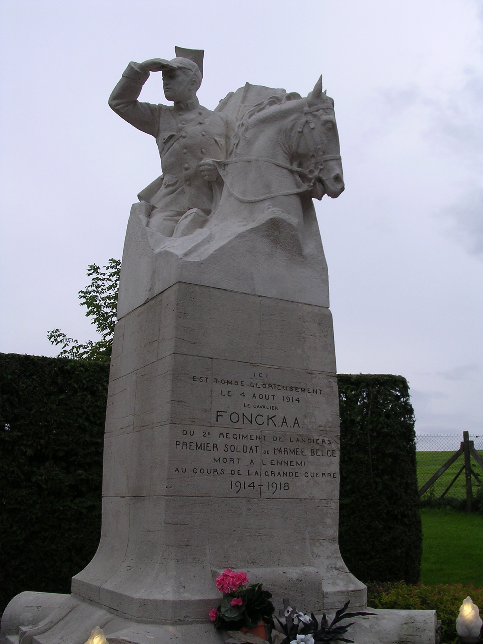 monument en hommage au cavalier Fonck - chaussée Charlemagne